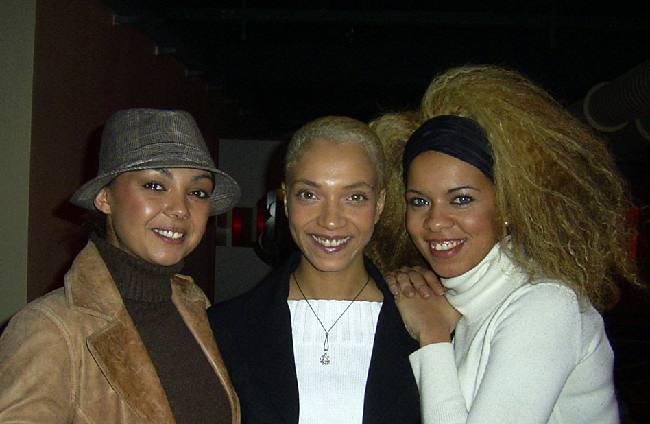 Tic Tac Toe beim Fanclubtreffen 2005